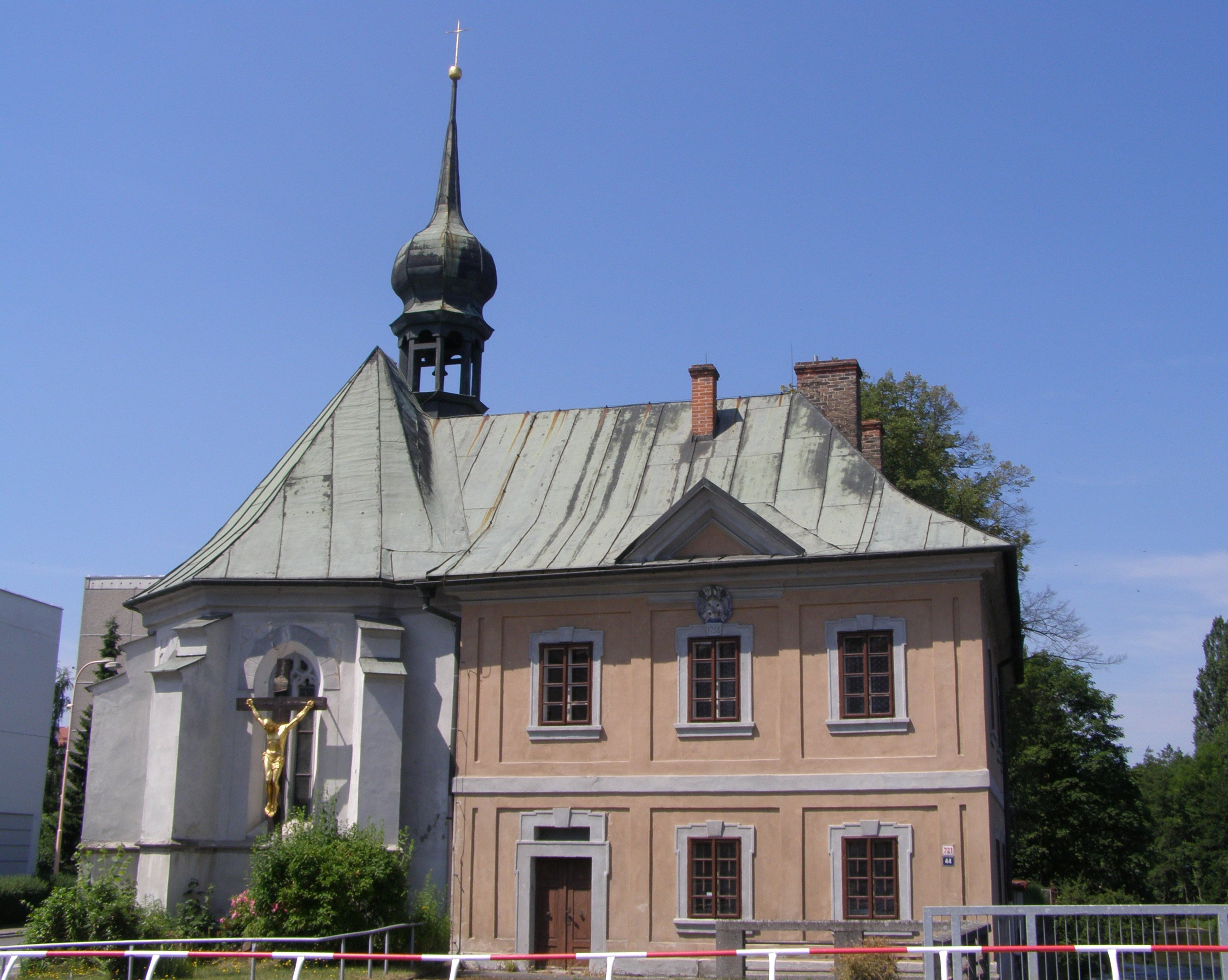 Česká Lípa, ulice Hrnčířská, kostel svaté Maří Magdaleny